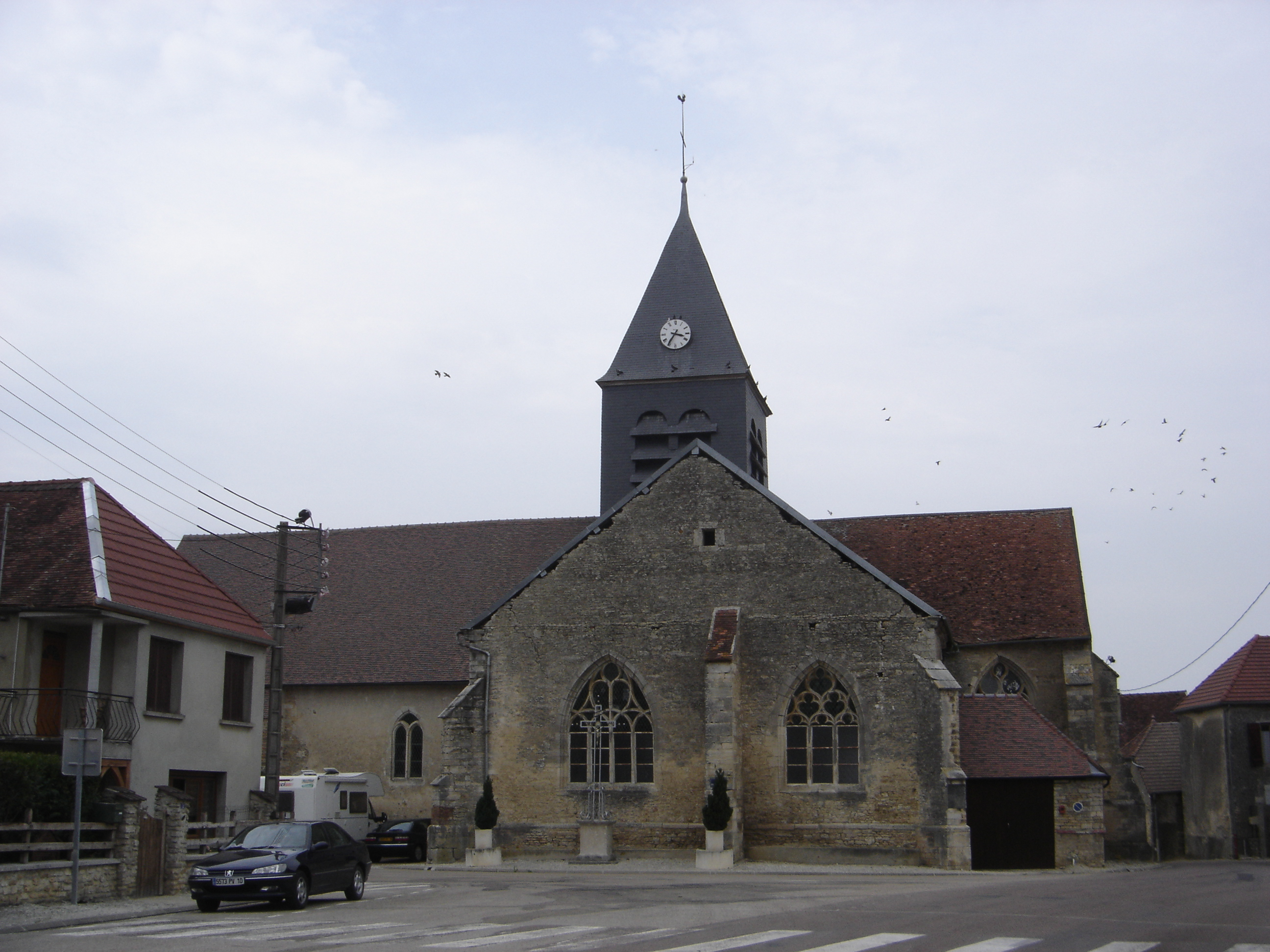 église Saint Andoche - Beurey - Aube - France